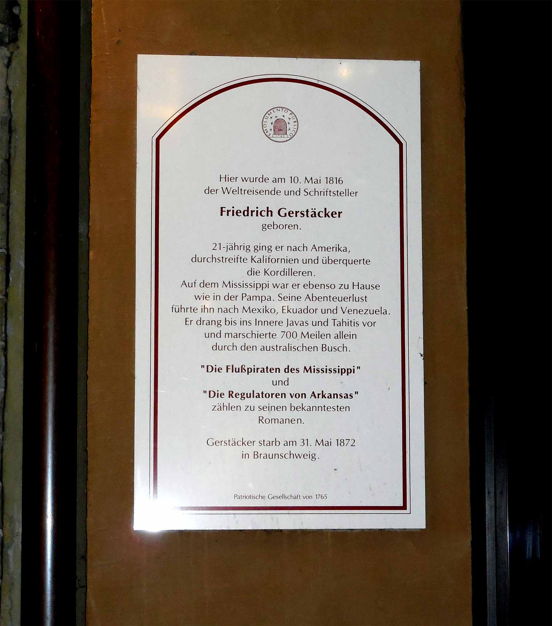 Gedenktafel am Gebäude Poststraße 19 in Hamburg zu Friederich Gerstäcker